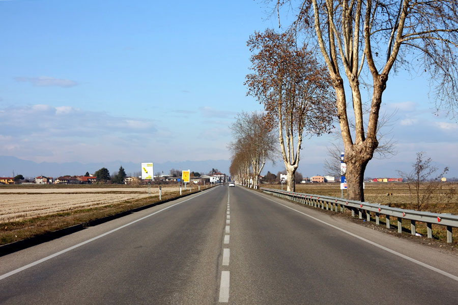 Strada provinciale 211 della Lomellina nel tratto tra Vespolate (NO) e Nibbiola (NO) in direzione di Novara